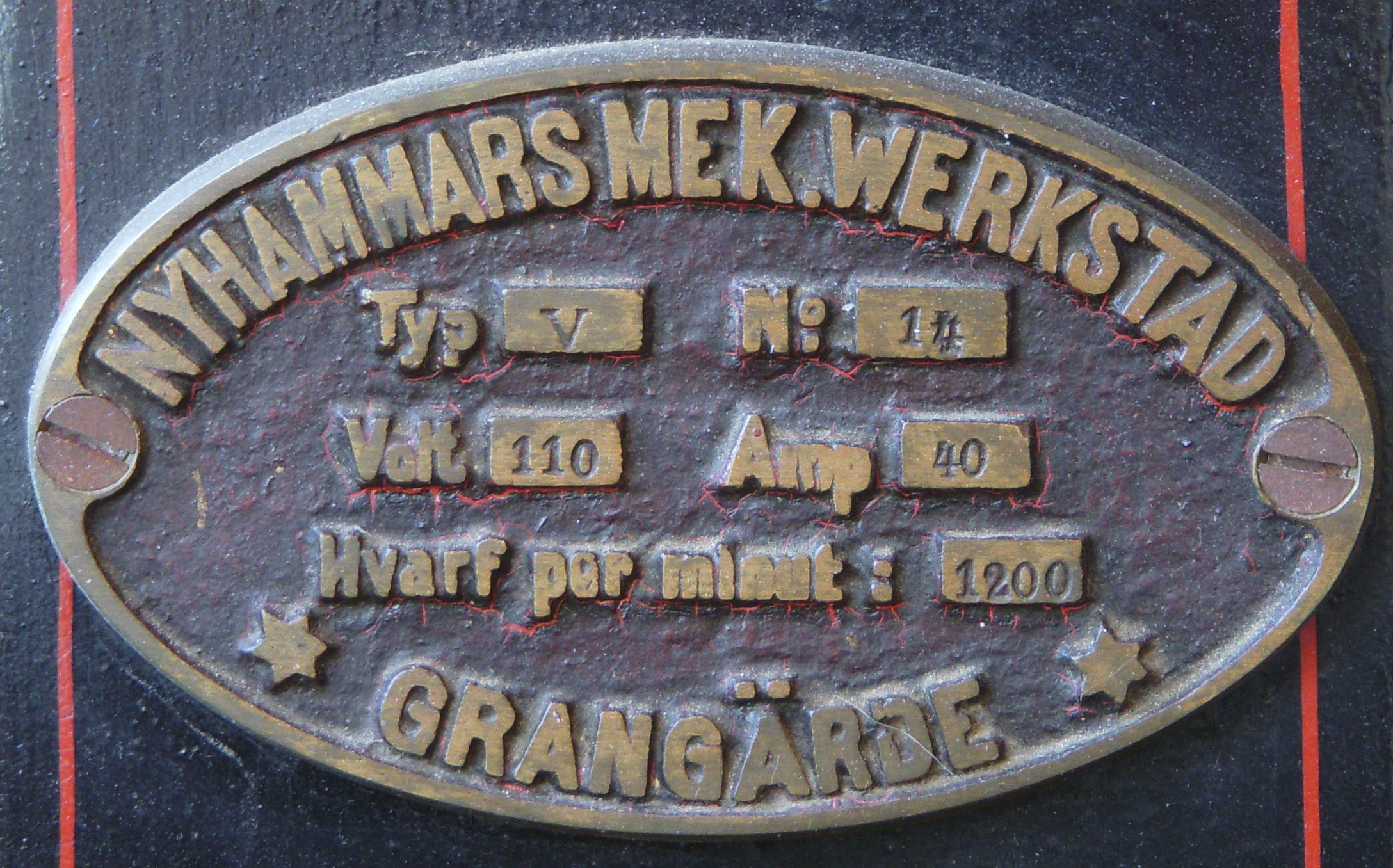 Nyhammars bruk generator typskylt